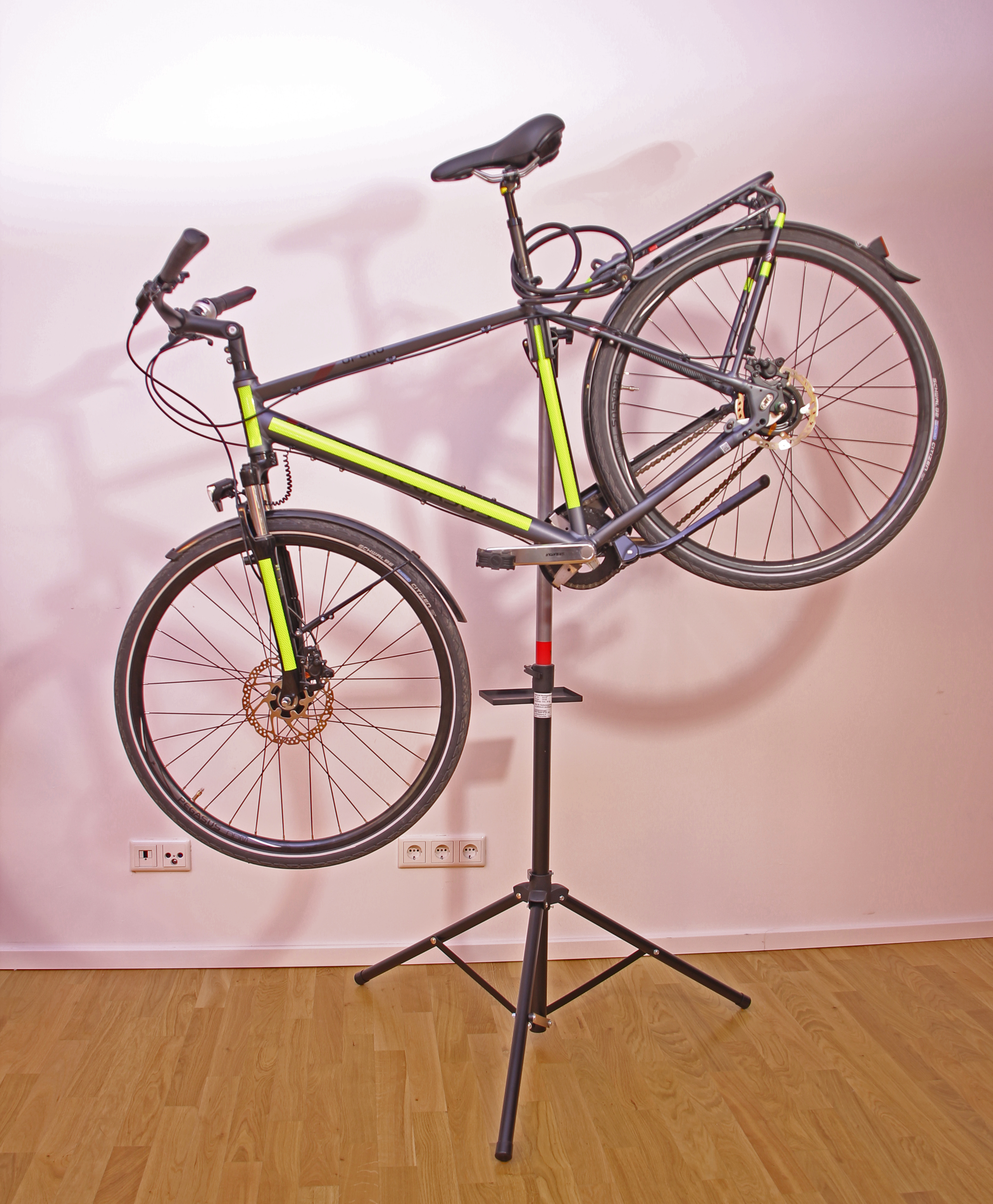 Bildinhalt: Dreibeiniger Montageständer mit Fahrrad Aufnahmeort: Frankfurt am Main, Deutschland